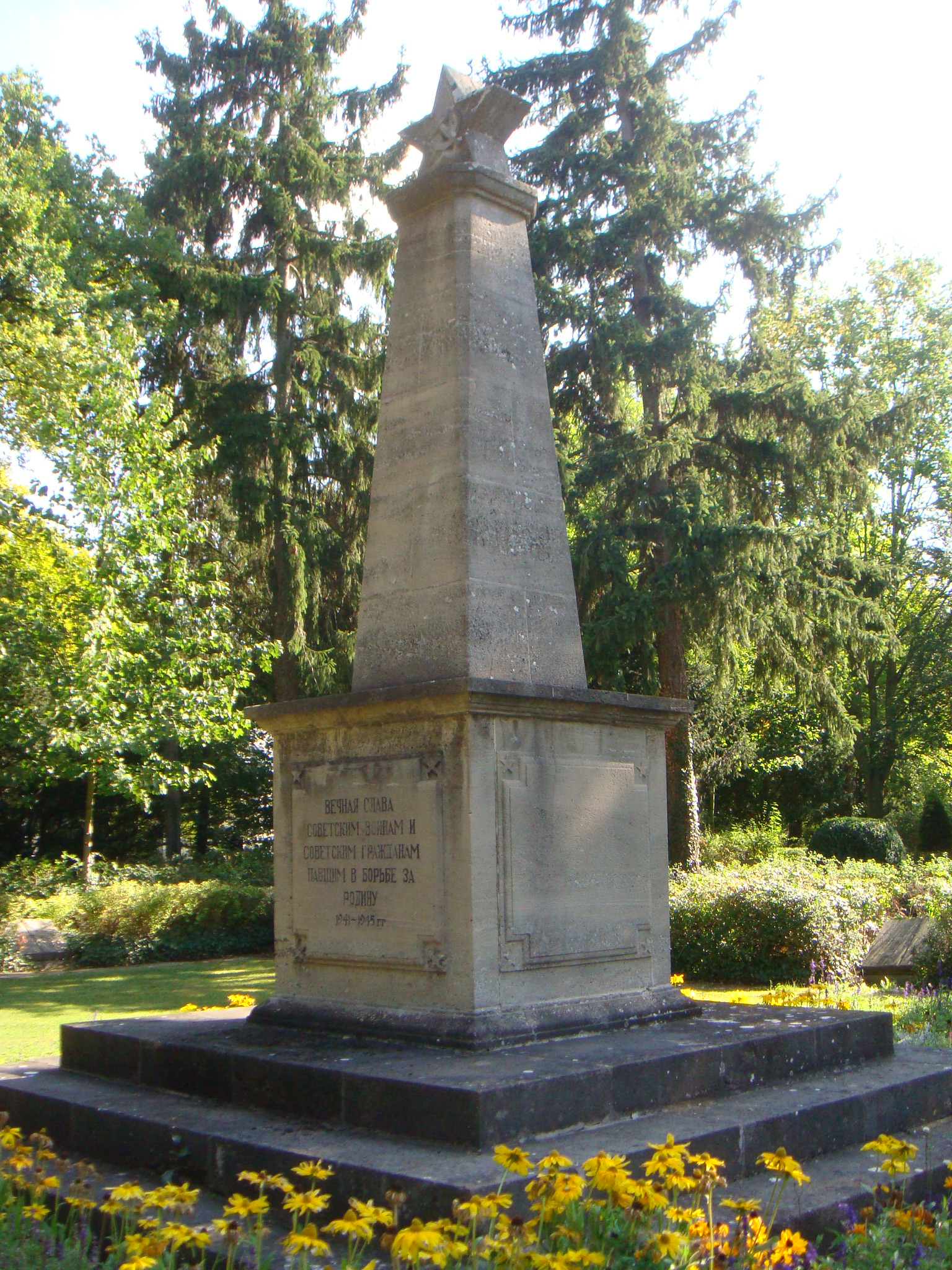 Sowjetisches Ehrenmal auf dem Friedhof von Sömmerda